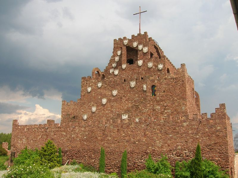 Kałków Godów.